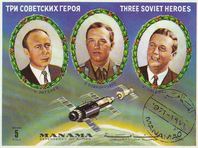 Soyuz 11